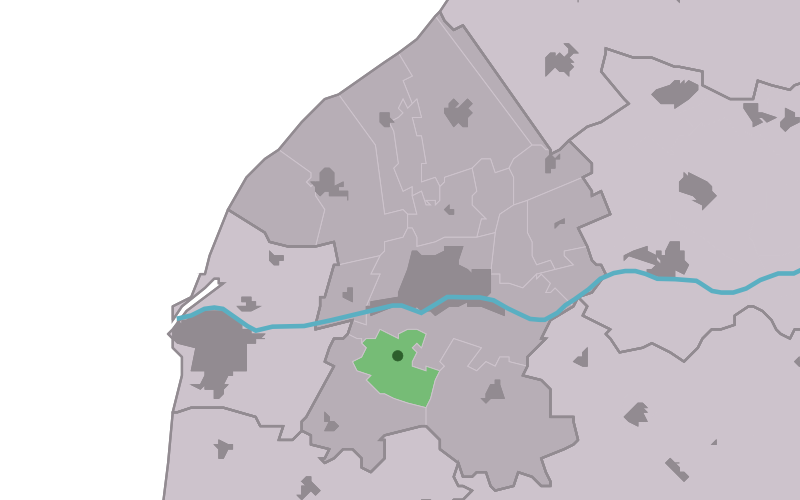 Kaartsje fan himrik fan Hitsum